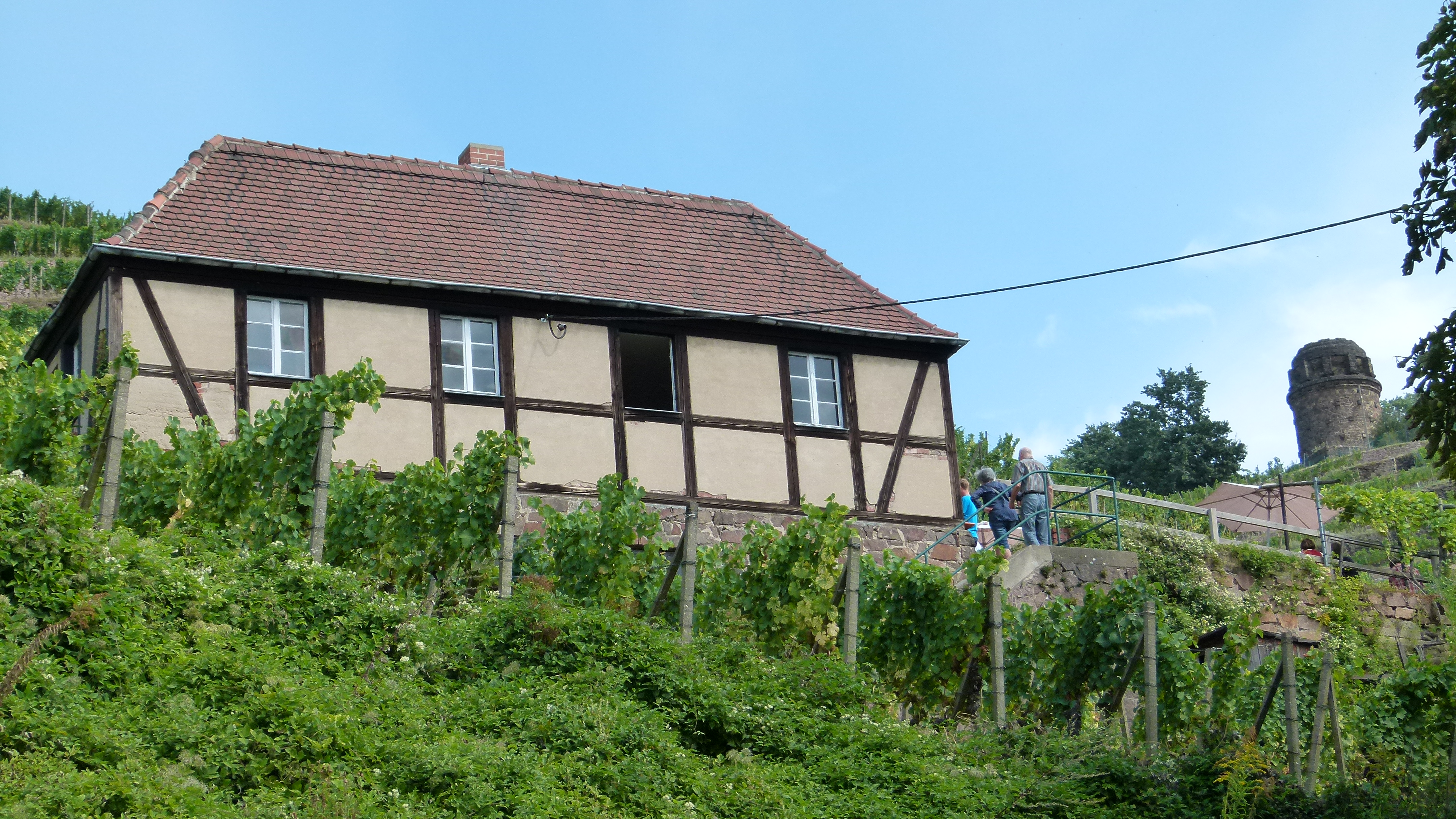 Denkmalgeschütztes Gerätehaus, Am Goldenen Wagen 9000-II, Radebeul, Sachsen